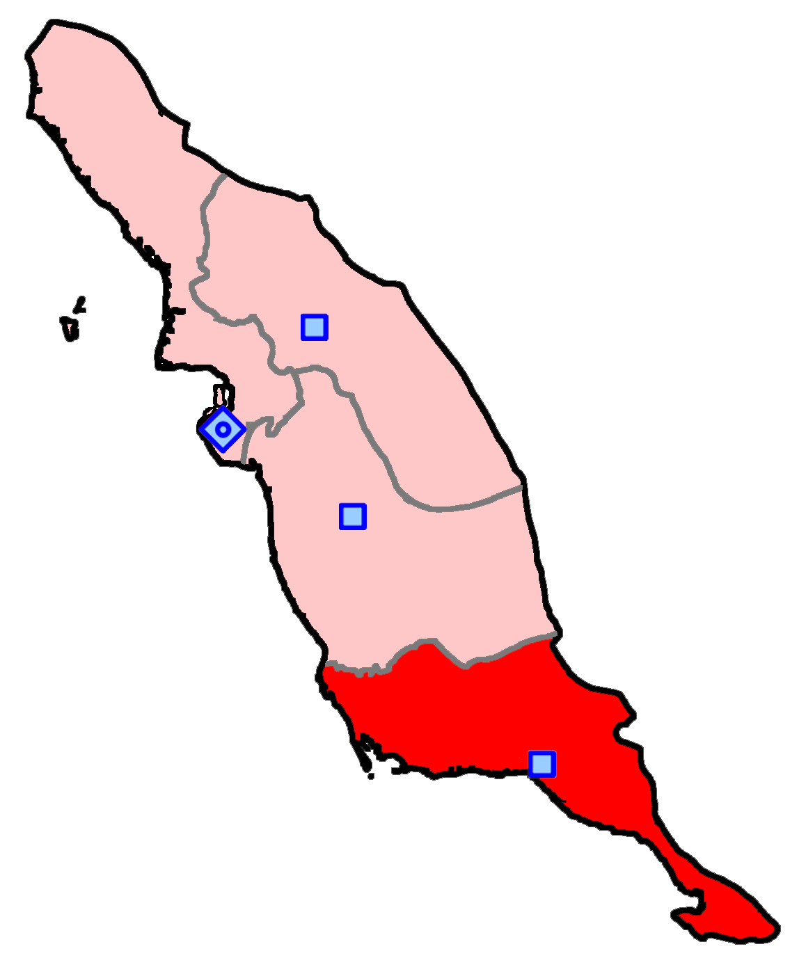 حوزهٔ انتخاباتی کنگان و دیر و جم و عسلویه برای انتخابات مجلس شورای اسلامی